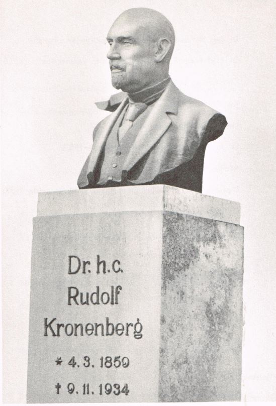 Scan aus 60 Jahre Kronprinz AG 1957, Seite 6